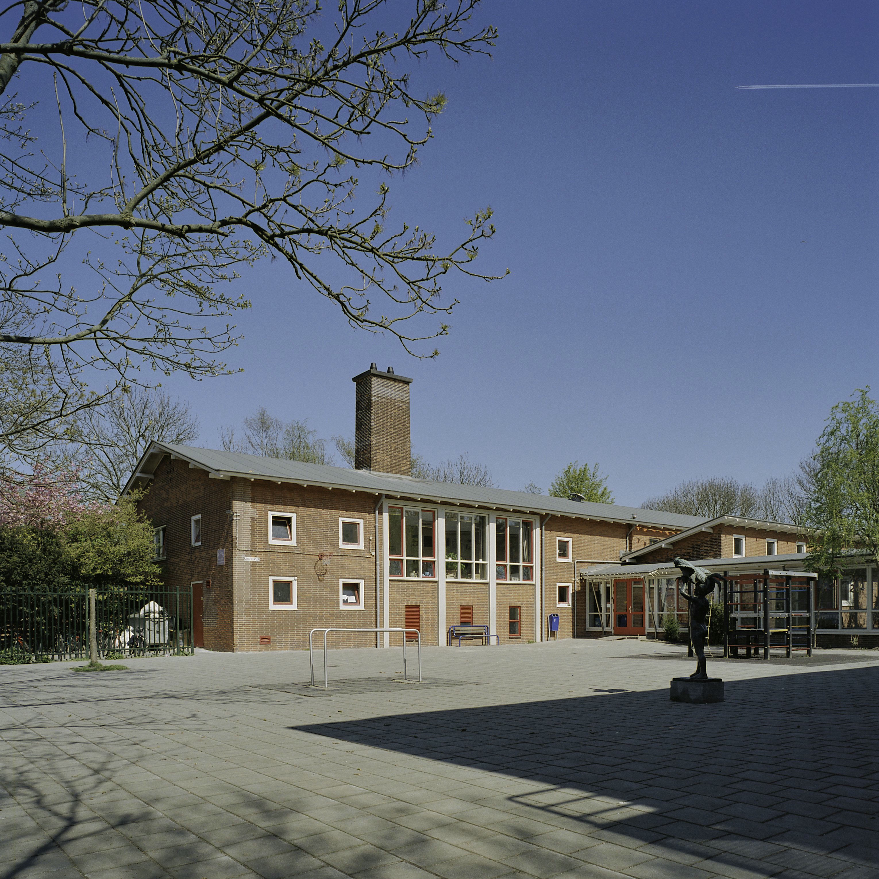 Slotermeer/ School: Overzicht linker gedeelte van voorgevel, gezien vanaf het schoolplein (opmerking: Gefotografeerd voor Monumenten In Nederland Noord-Holland)